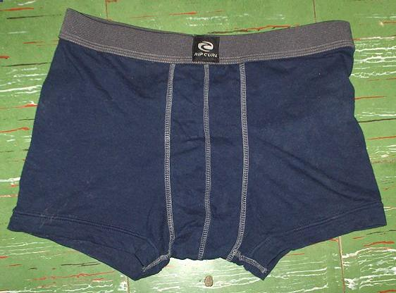 A male boxer brief